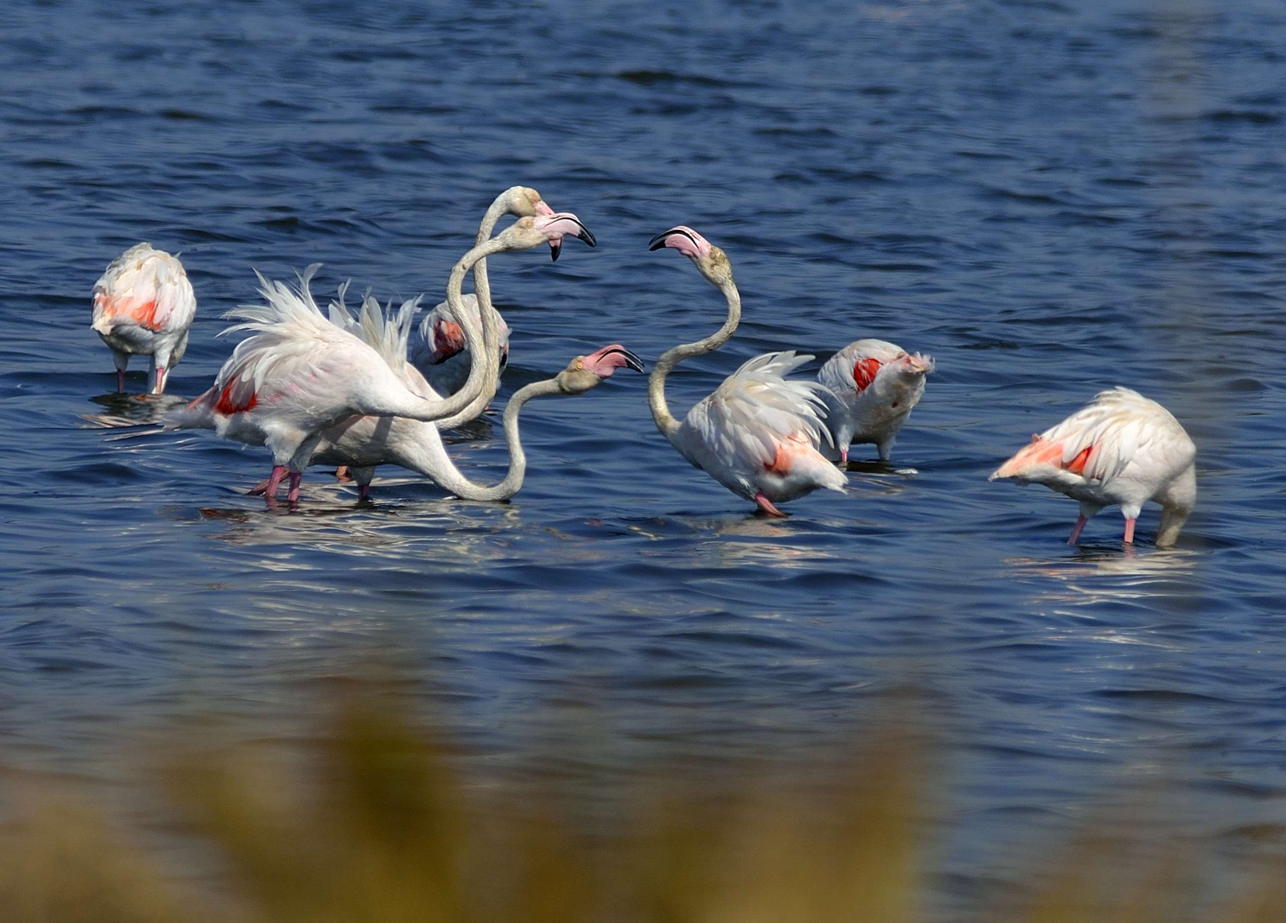 Riserva naturale Laguna di Orbetello di Ponente This is a photo of a monument which is part of cultural heritage of Italy. The authorisation for taking photos of this object was provided by the World Wide Fund for Nature Italy.